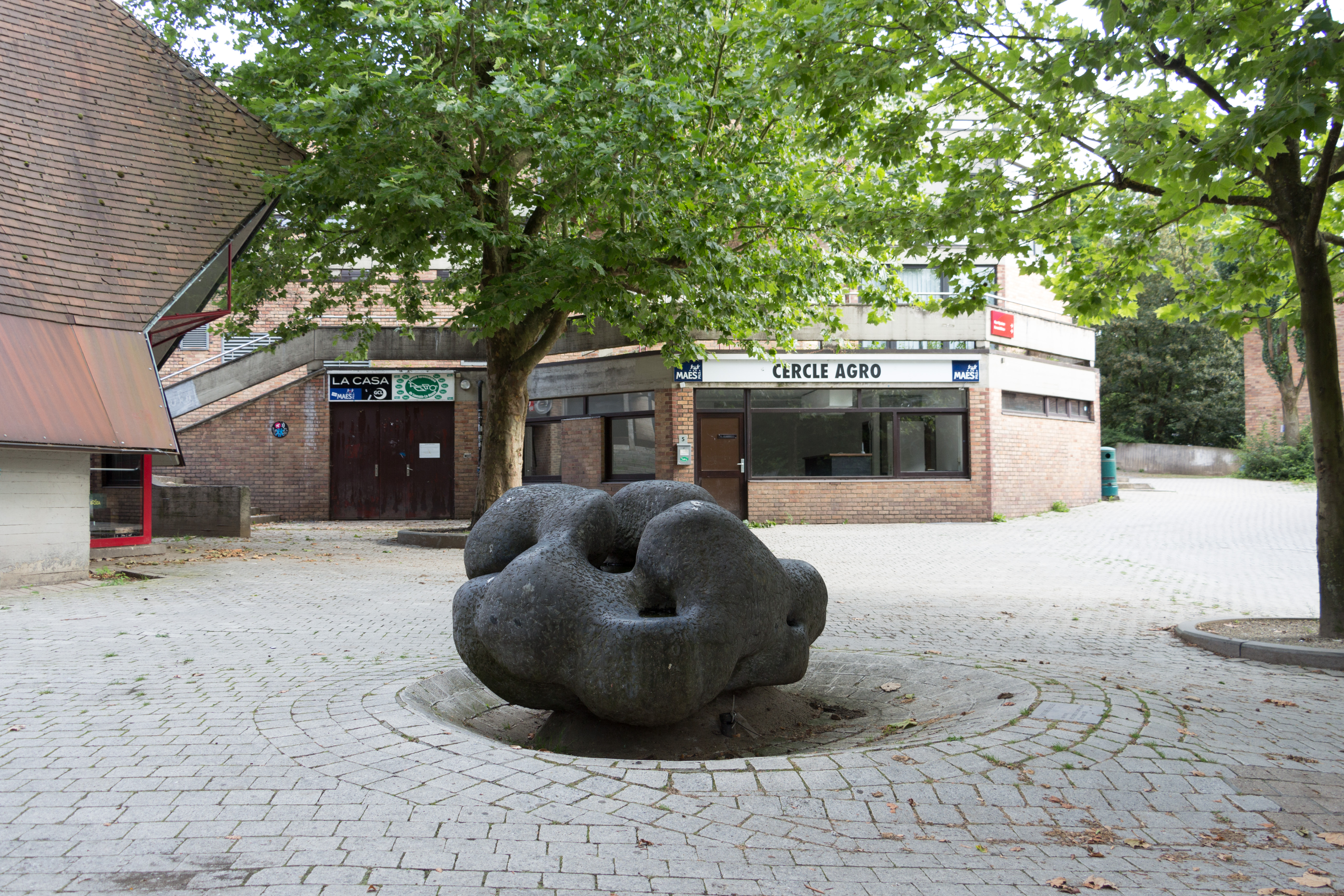 La Place Galilée, située dans le quartier du Biéreau, est entourée de nombreux cercles et régionales.